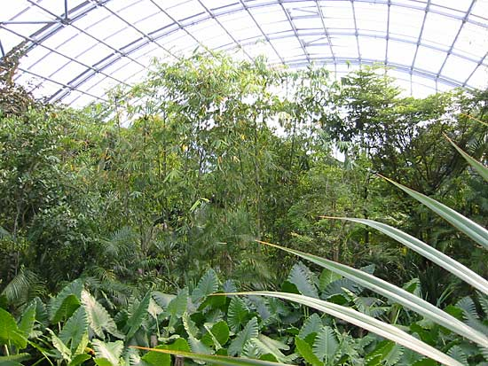 ==Description in de wikipedia== Beschreibung: Die Masoala-Halle im Zoo Zürich in fast ihrer ganzen Länge. Im Vordergrund liegt das Sumpfgebiet. Quelle: Juni 2004 Fotograf: Lars Haefner Lizenzstatus: GNU FDL